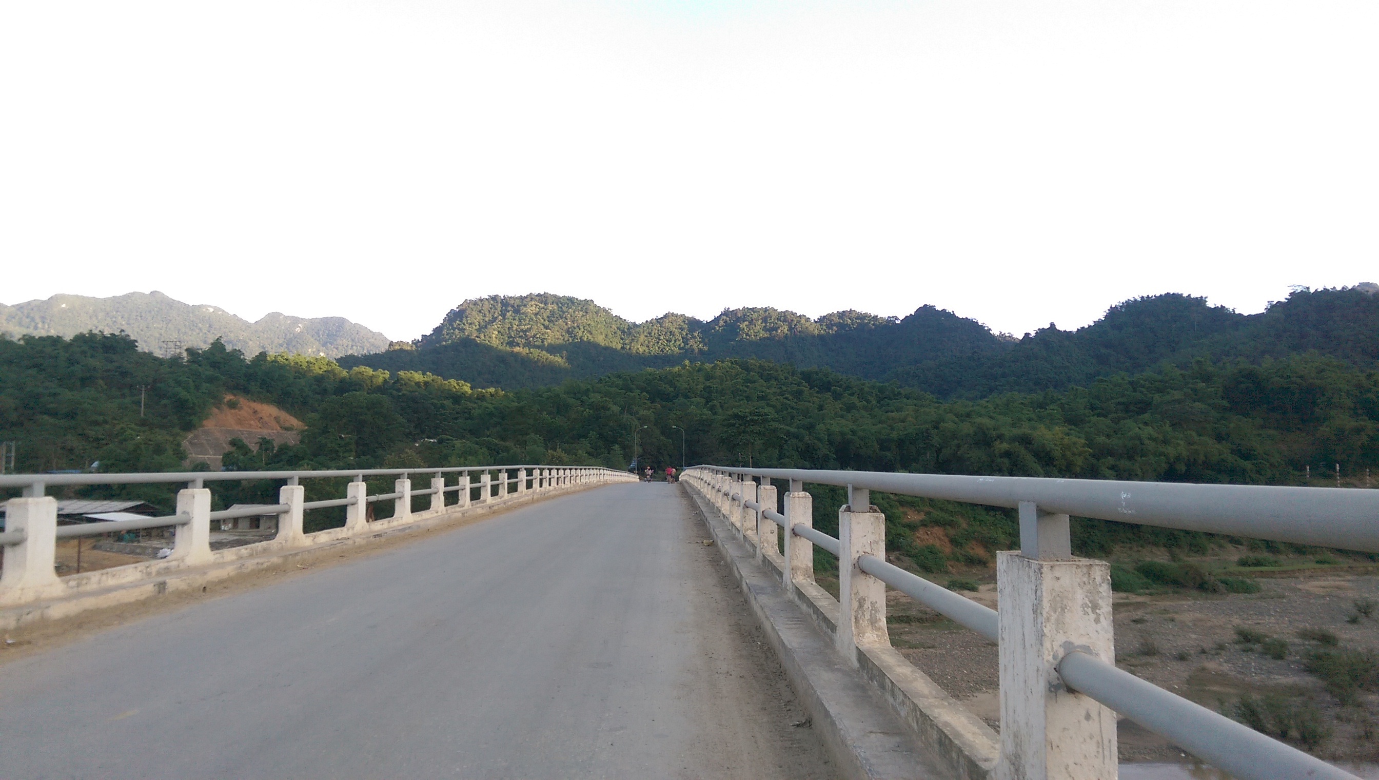 Cầu Na Sài, thị trấn Hồi Xuân, huyện Quan Hóa, tỉnh Thanh Hóa